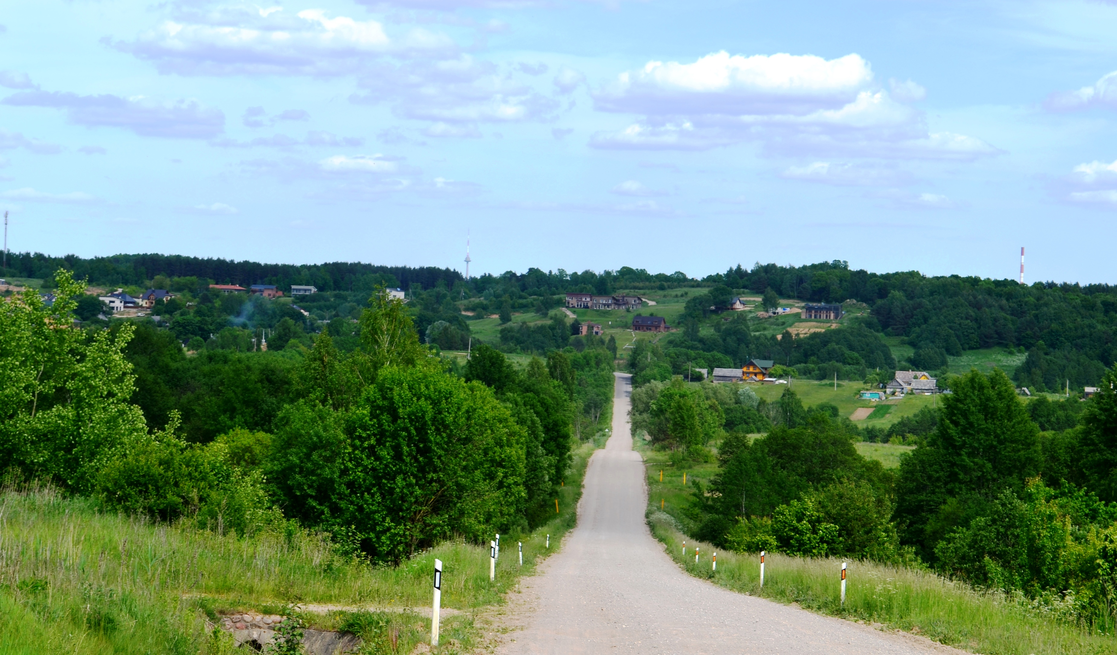 Dėdeliškės nuo Kariotiškių pusės, Trakų raj.